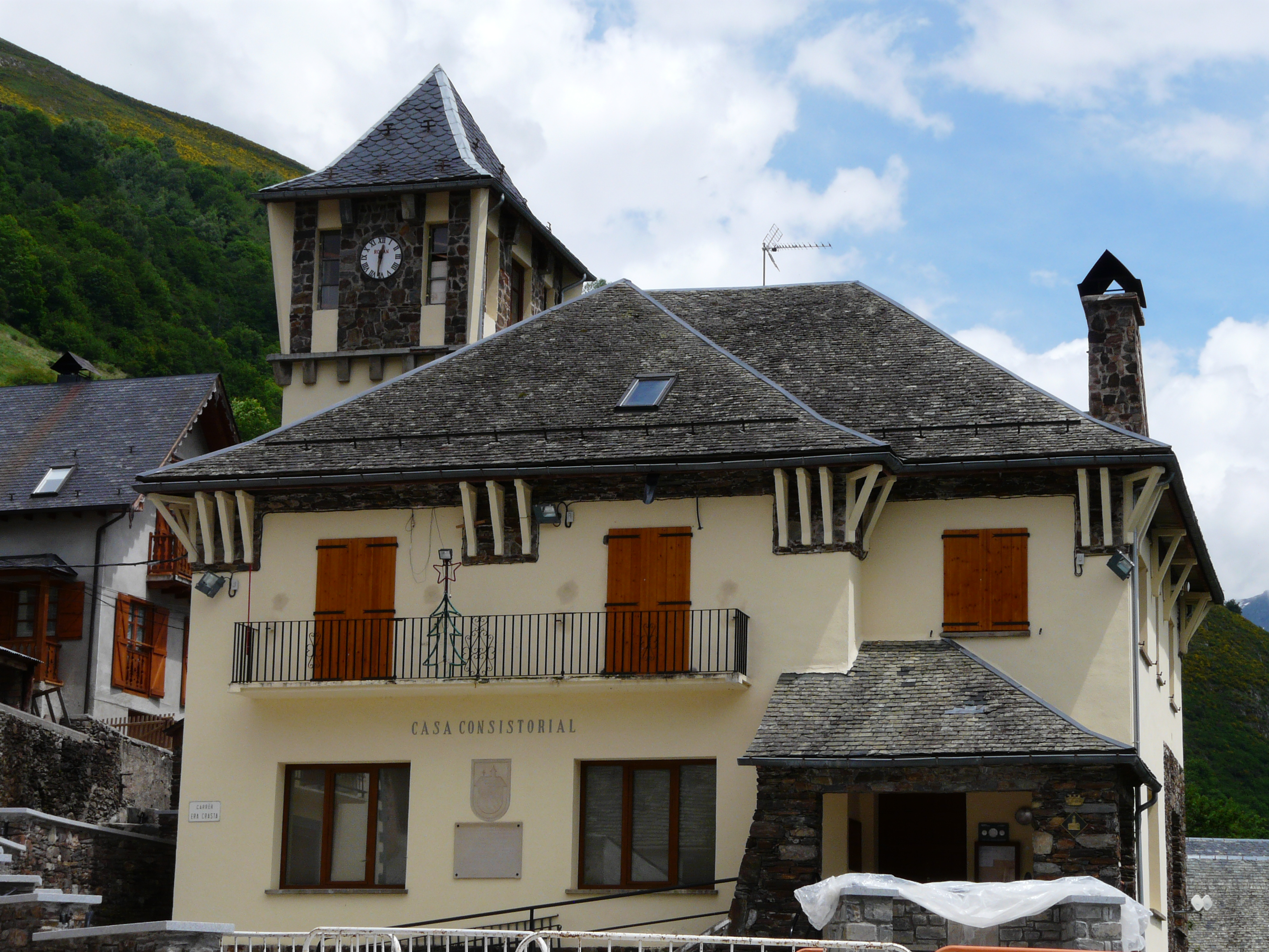 La mairie de Canejan, Val d'Aran, Catalogne, France.